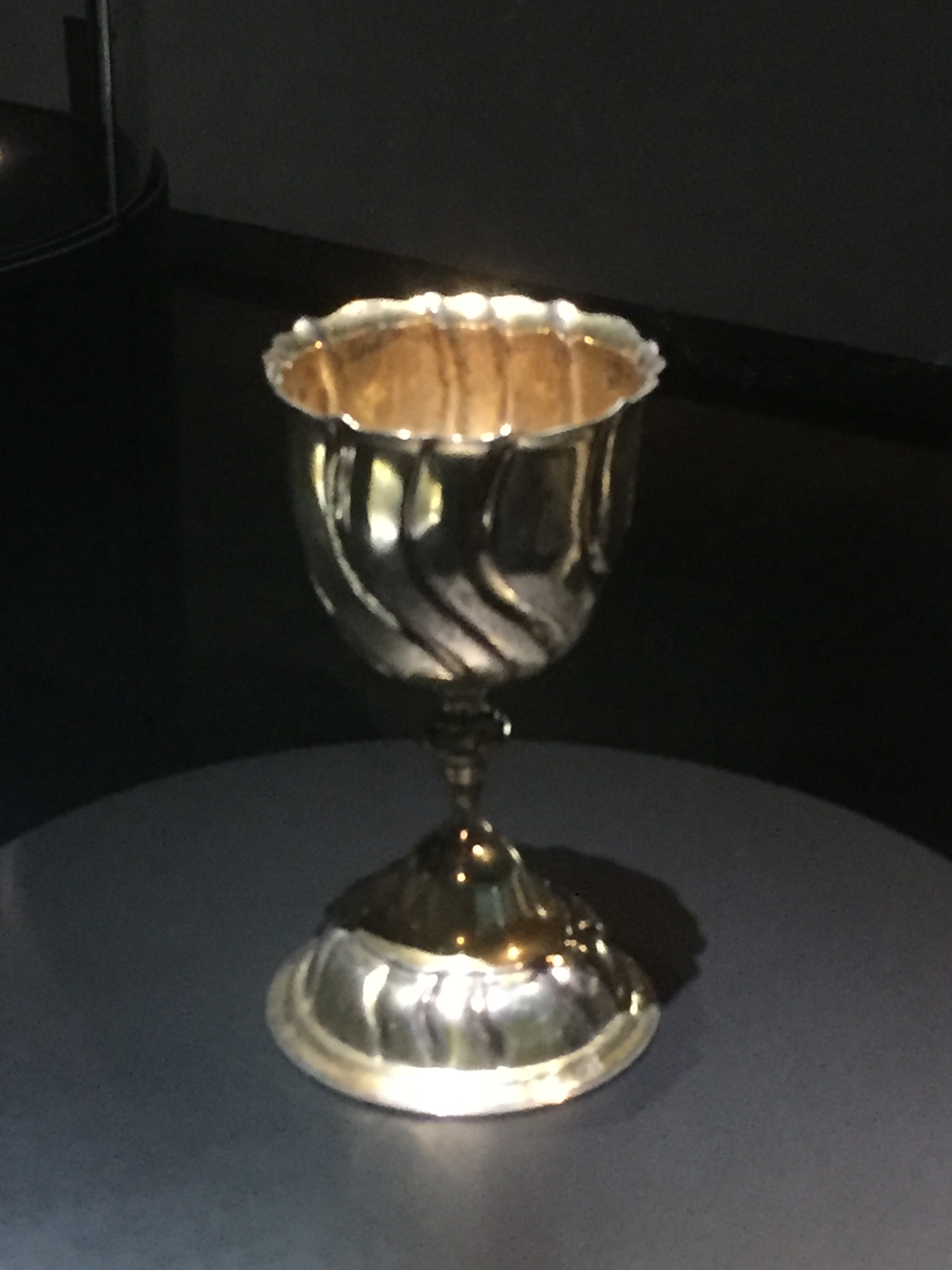 Kiddusch-Becher (um 1750) aus dem jüdischen Museum Judengasse Frankfurt am Main